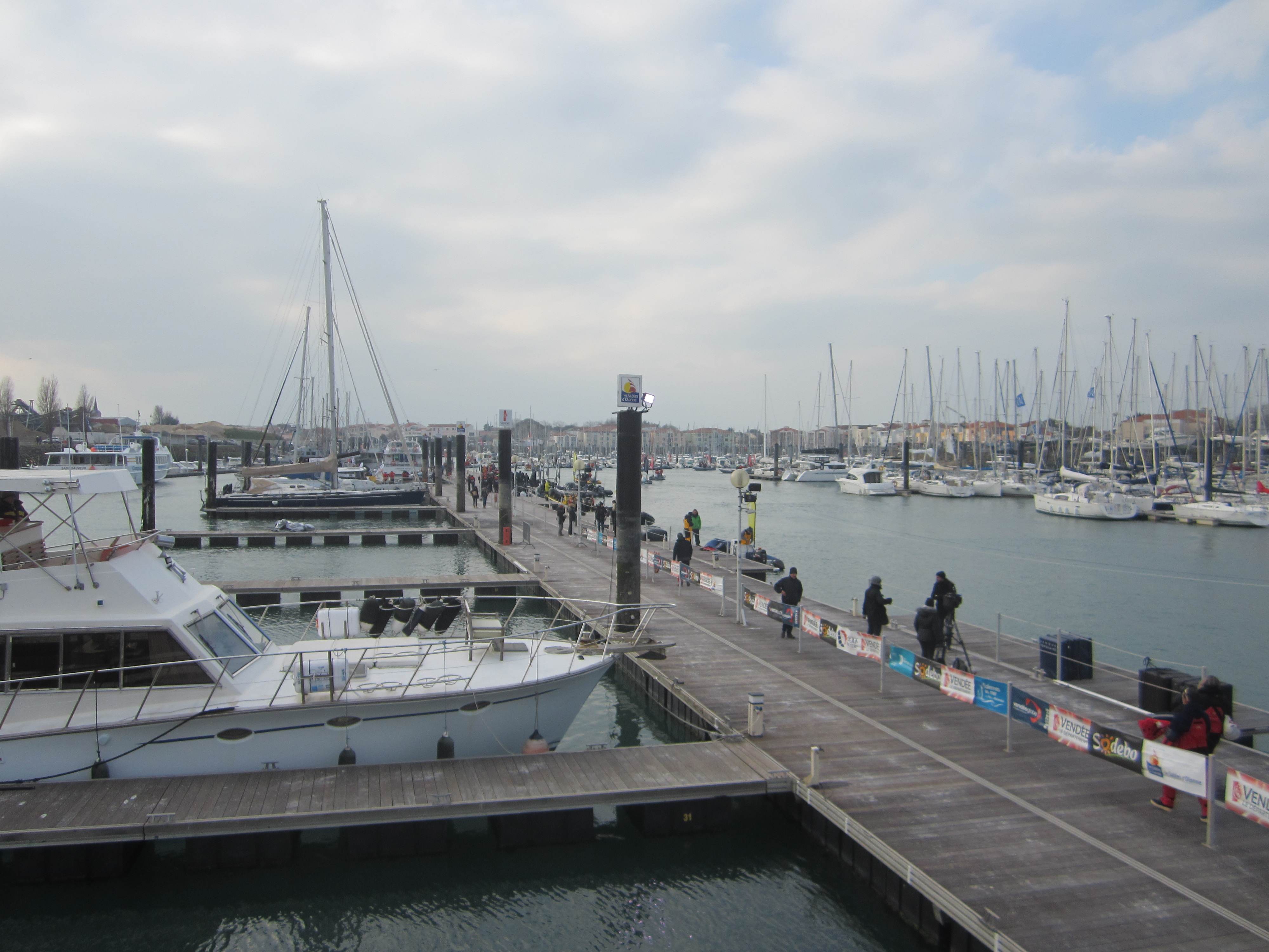 Le ponton du Vendée Globe à Port Olona attendant l'arrivée d'Armel Le Cléach.